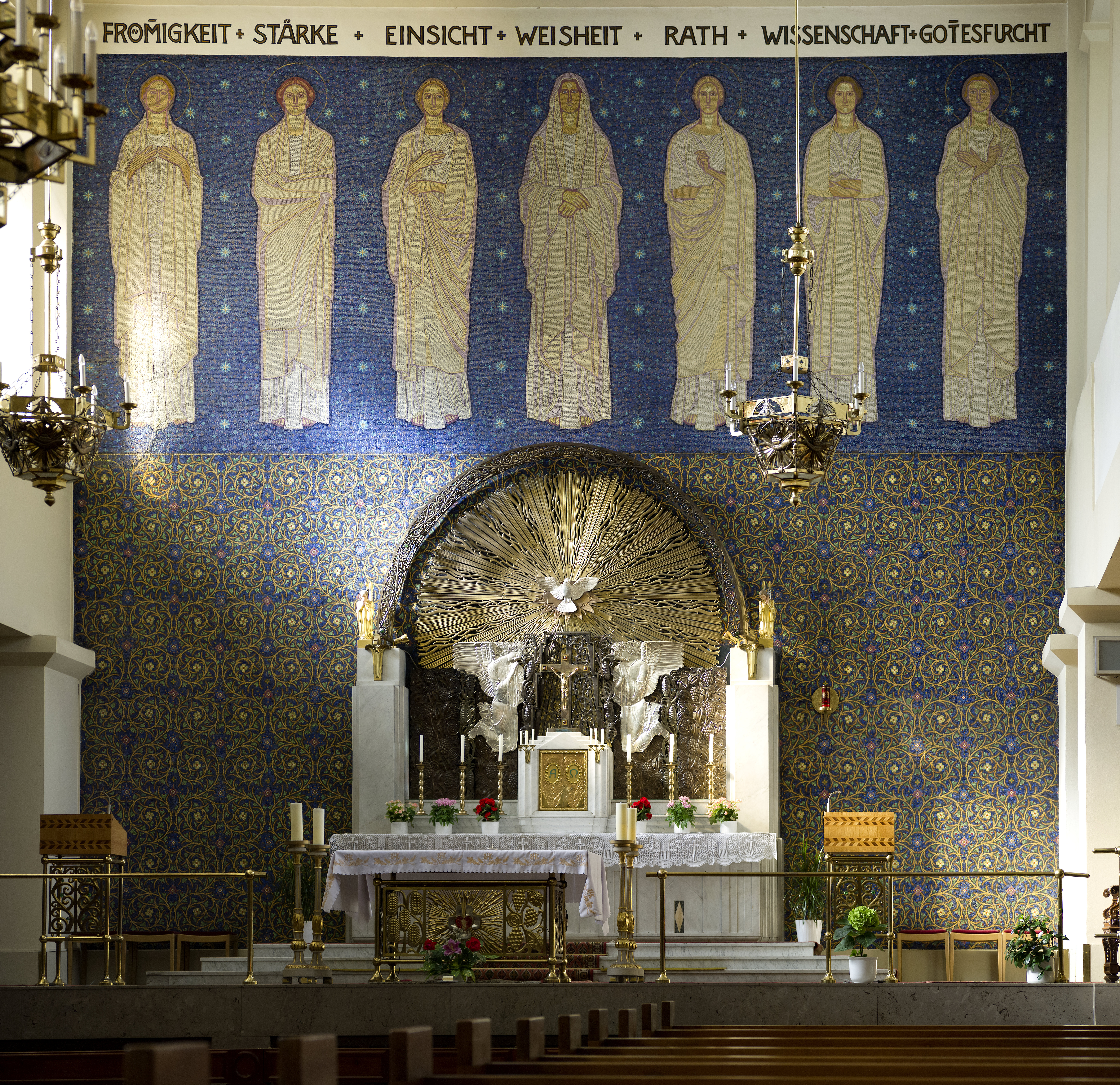 Schmelzer Pfarrkirche hl. Geist